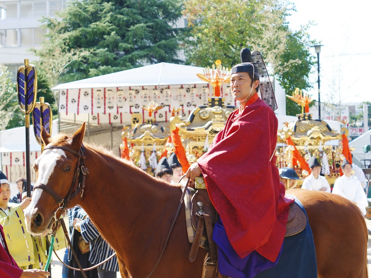 佐世保くんちの様子。